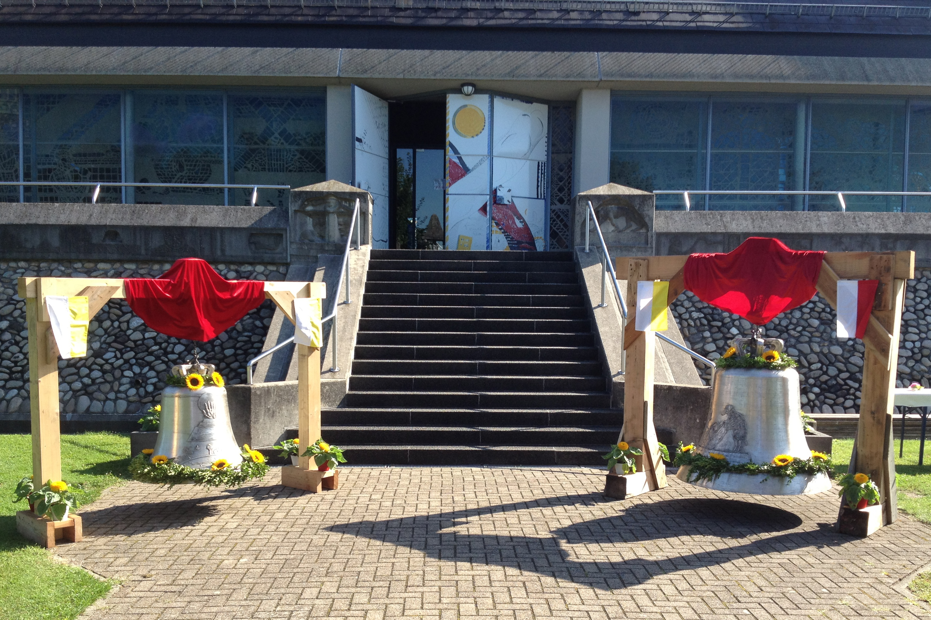 Die zwei neuen Glocken der Autobahnkirche St. Christophorus. Gegossen 2012 bei der Firma Bachert in Karlsruhe.